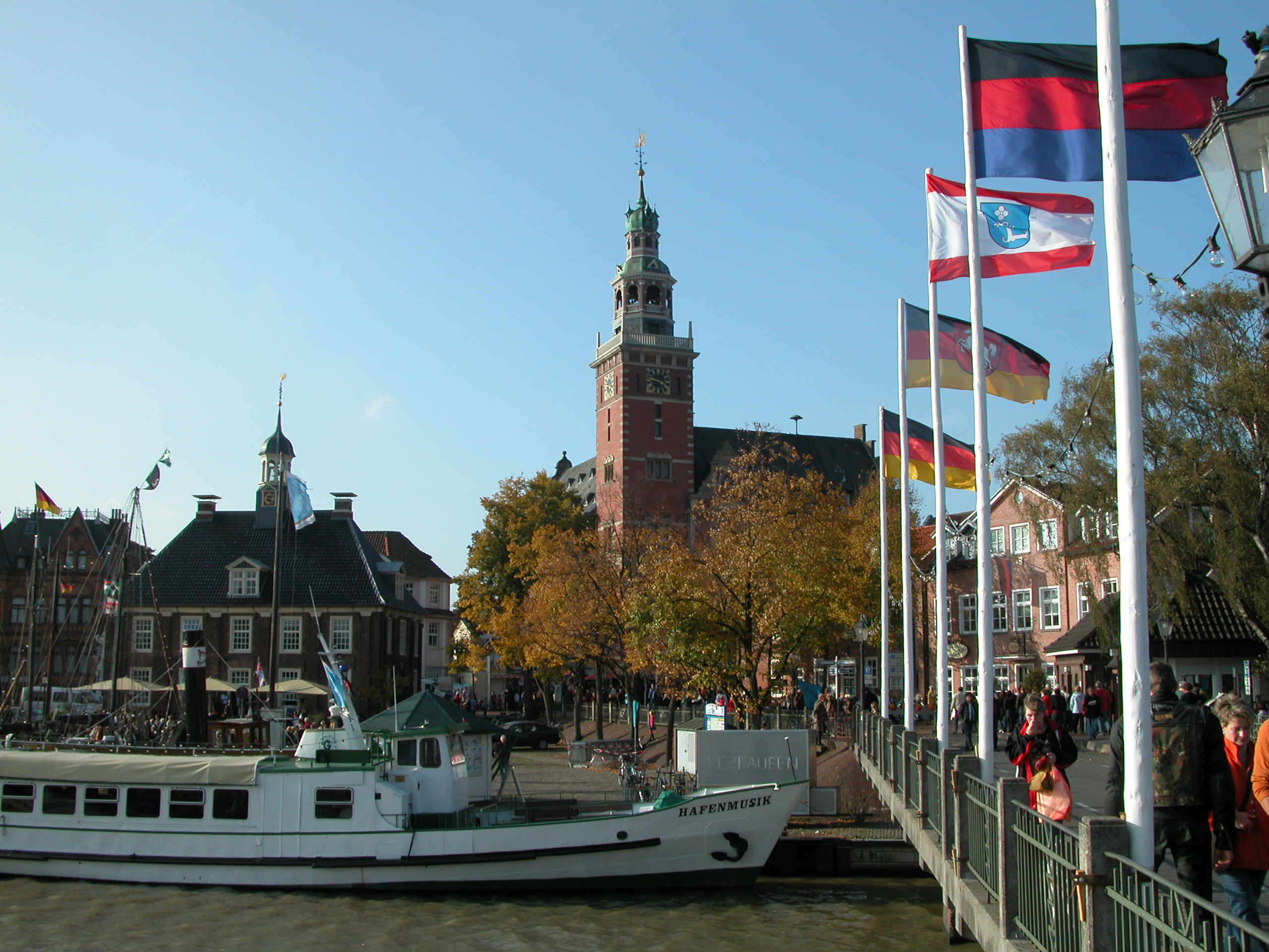 Leer: Alte Waage links, Rathausturm im Zentrum, Brücke (rechts) mit den Flaggen von (v.r.n.l.): Ostfriesland, Leer, Niedersachsen und Deutschland.